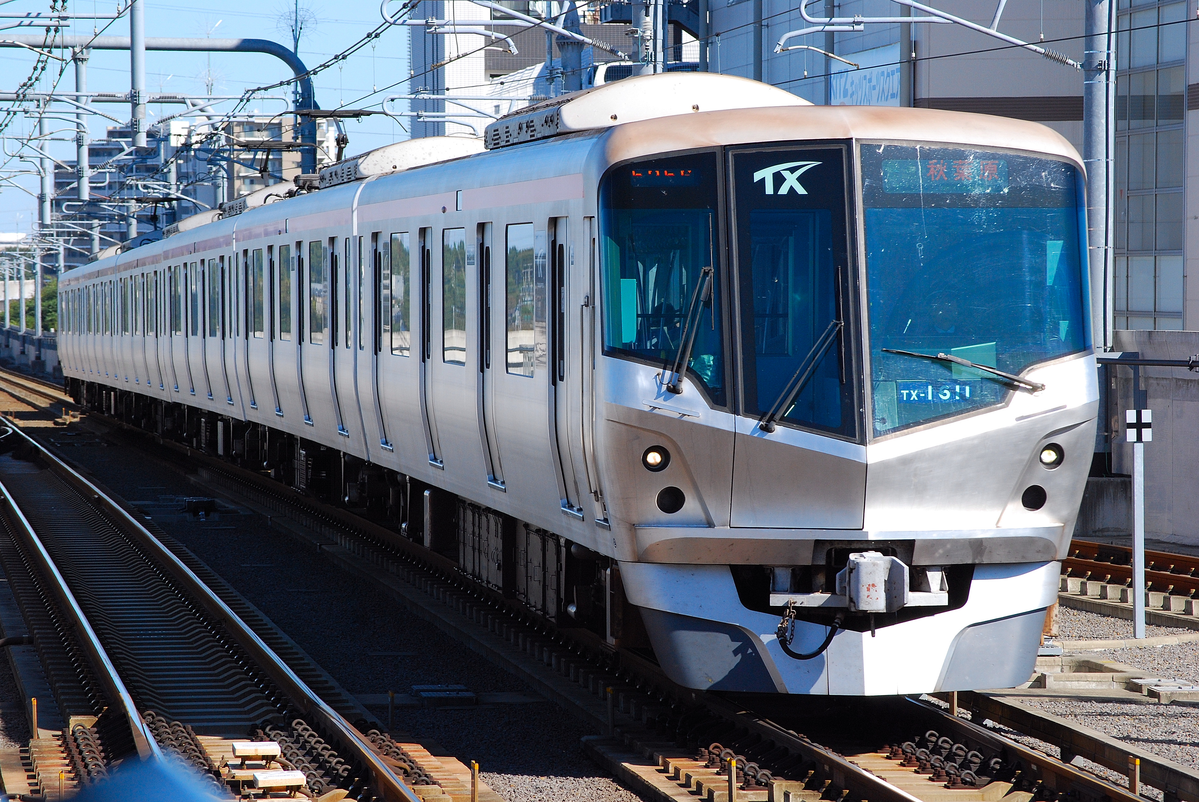 首都圏新都市鉄道TX-1000系（流山おおたかの森駅で撮影）